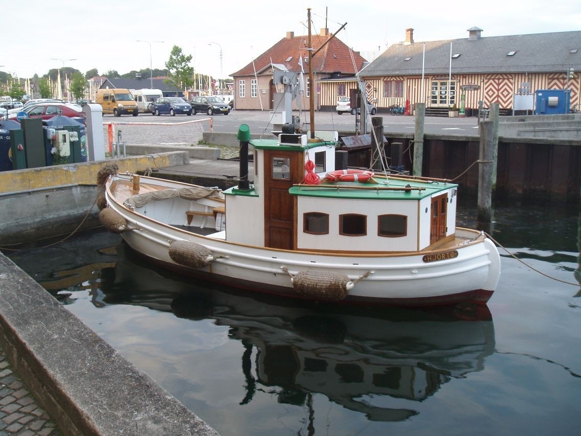 Postbåden Hjortø i Svendborg havn